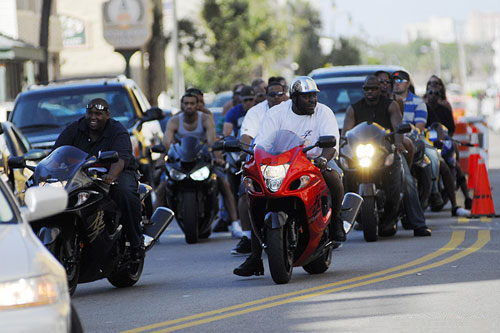 Black Bike Week Festival 2008